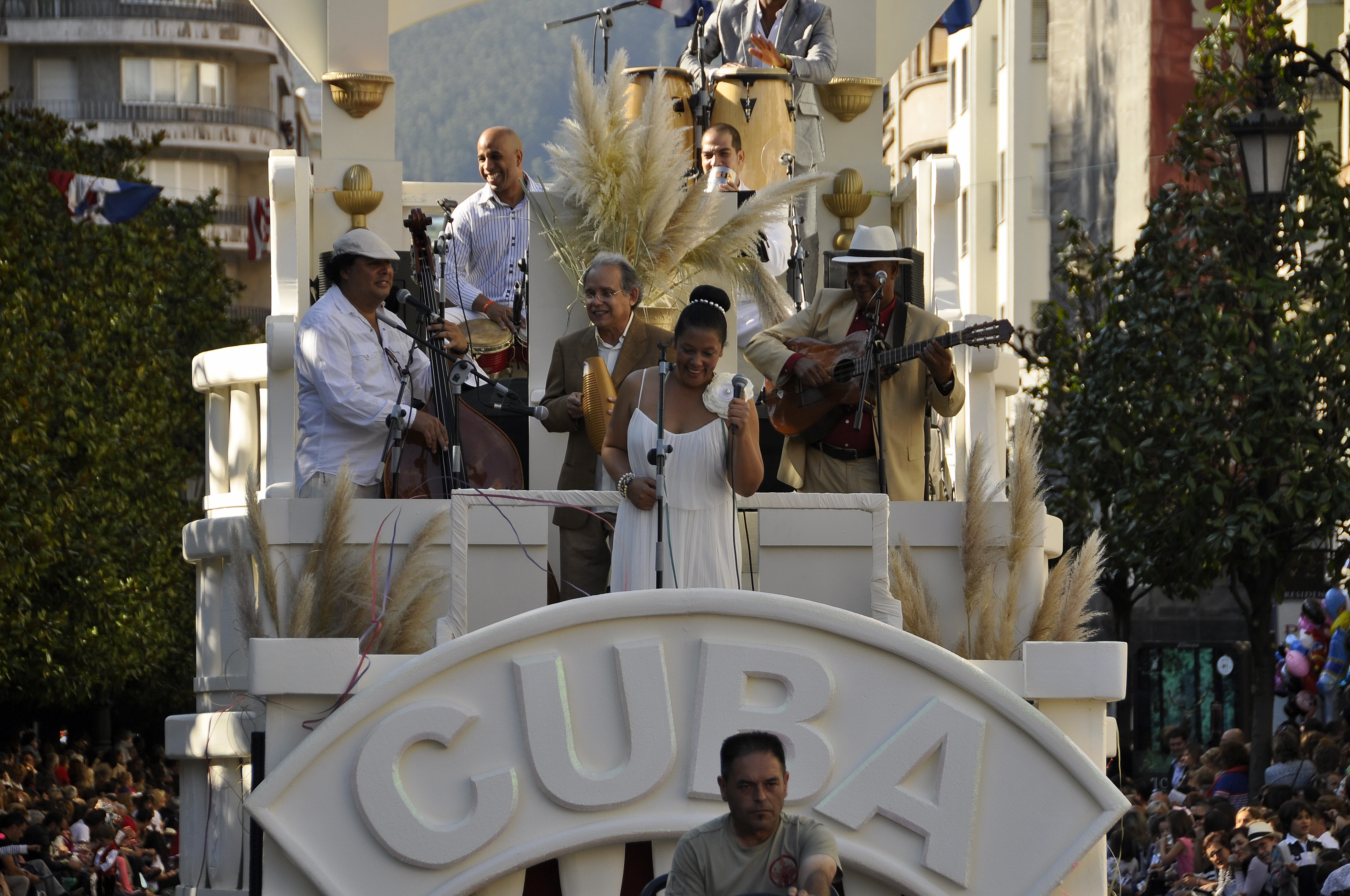 Fiestas de San Mateo-Oviedo-2015